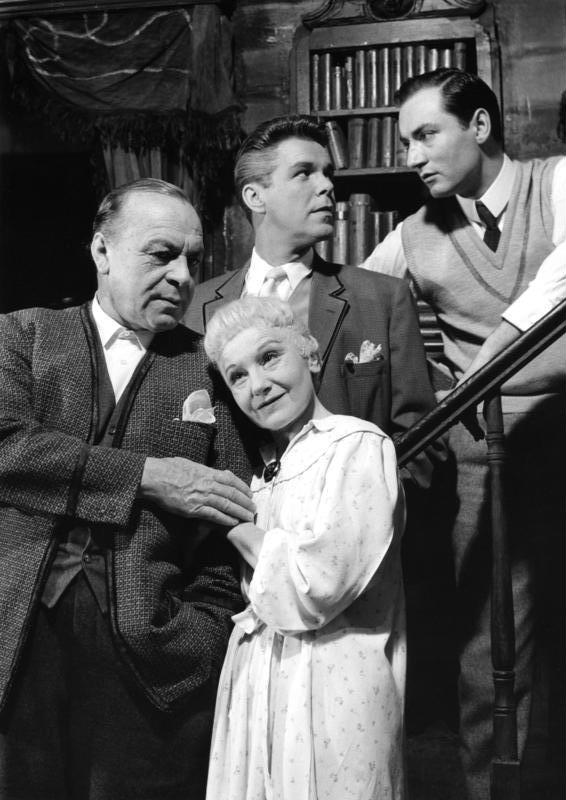 15.-17.1.1957 Gastspiel des Düsseldorfer Schauspielhauses im Schauspielhauses im Stadttheater Bad Godesberg Eines langen Tages Reise in die Nacht (Long day's journey into night) Schauspiel von Eugene O'Neill, Deutsch von Ursula und Oscar Fritz Schuh Regie: Karl Heinz Stroux Bühnenbild und Kostüme: Ita Maximowna James Tyrone - Paul Hartmann Mary Cavan Tyrone, seine Frau - Elisabeth Bergner James Thyrone jr., ihr ältester Sohn - Heinz Drache Edmund Tyrone, ihr jüngster Sohn - Martin Benrath Cathleen, Hausmädchen - Inge Rassaerts Schauplatz: Wohnzimmer im Sommerhaus der Thyrones an einem Augusttag des Jahres 1912